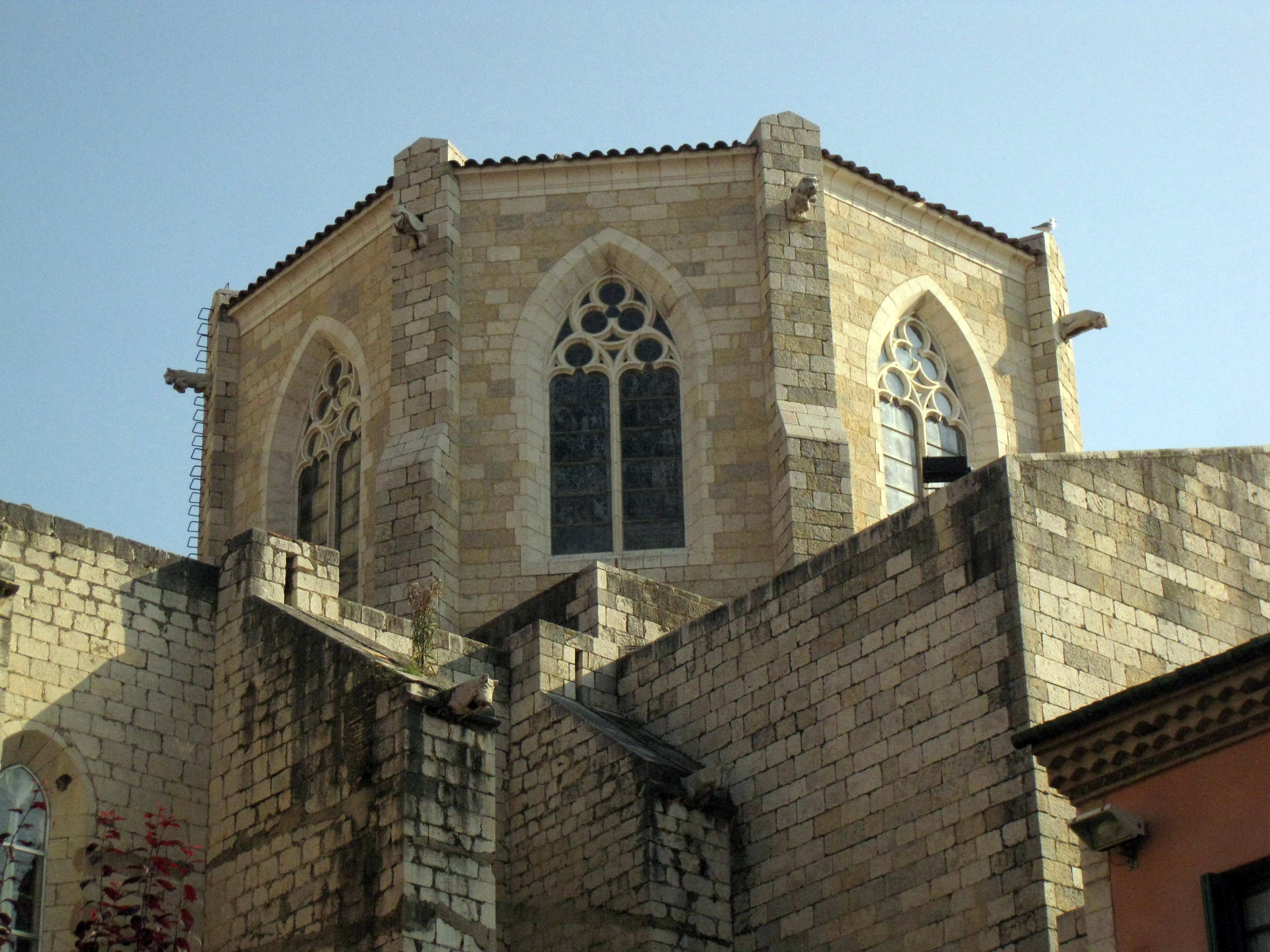 Església parroquial de Sant Pere (Figueres).